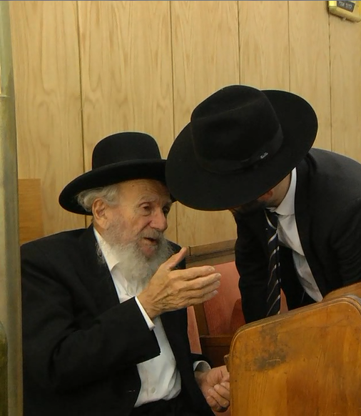 RABBI YAAKOV EDELSTEIN